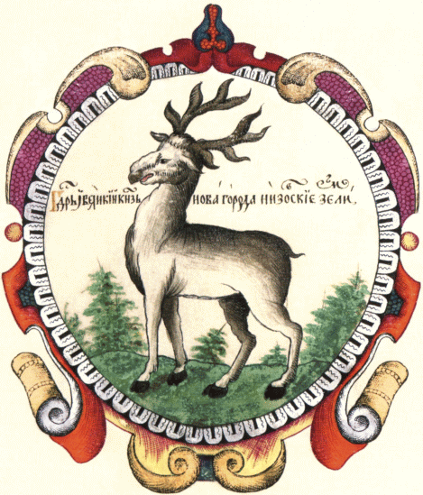 Герб Нижнего Новгорода в XVII веке